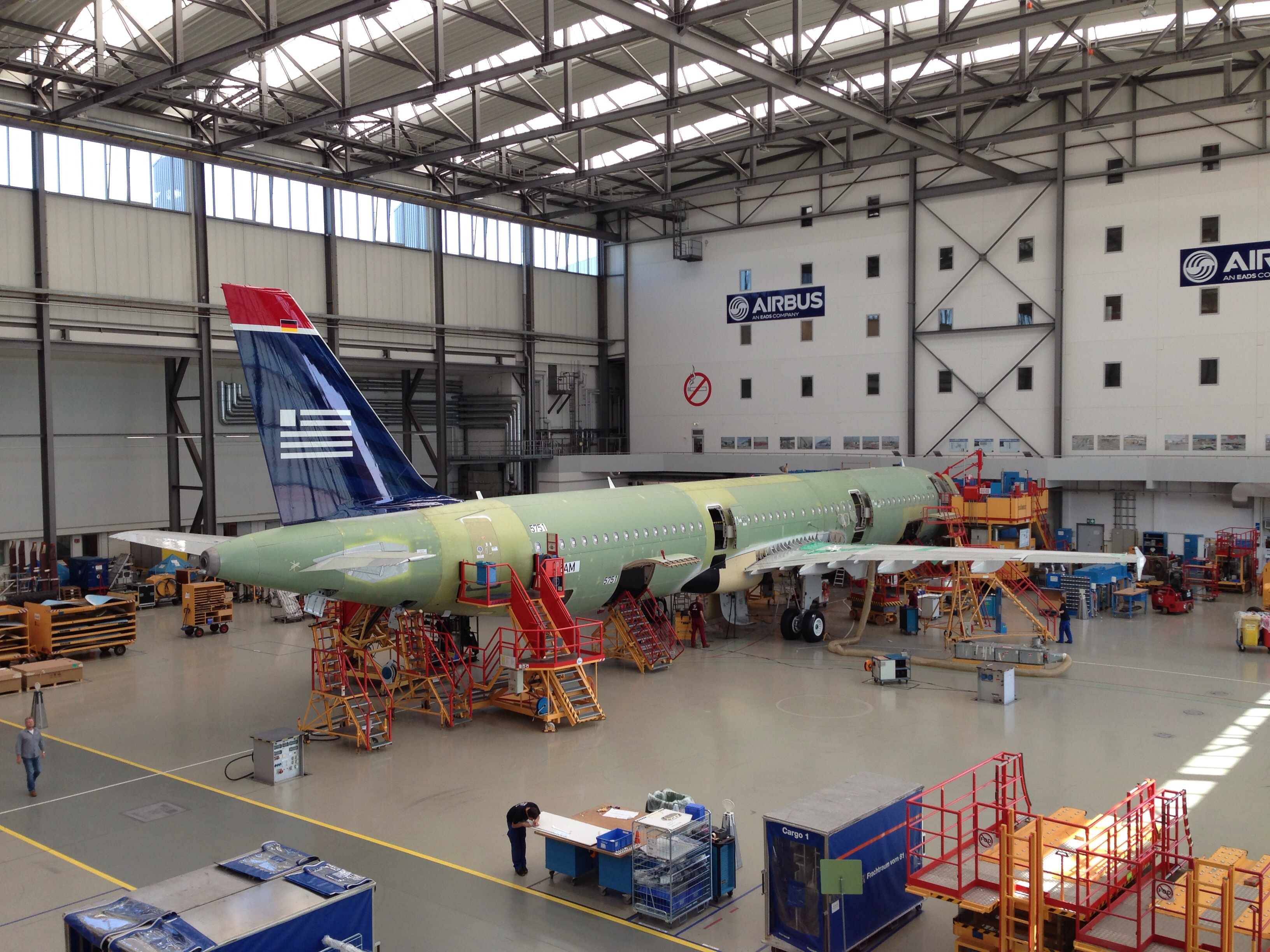 MSN 5751